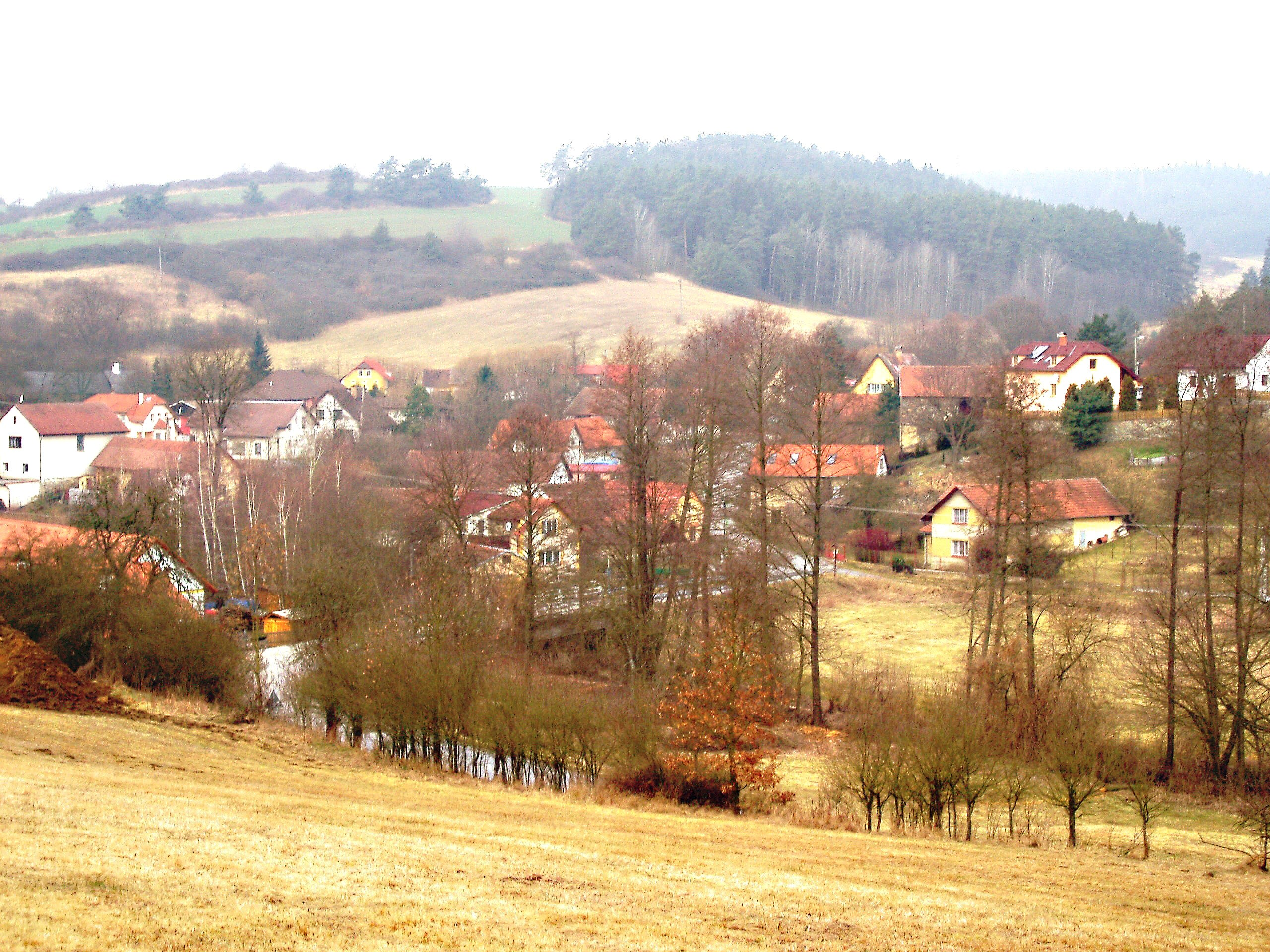 Luhy u Dolních Hbit